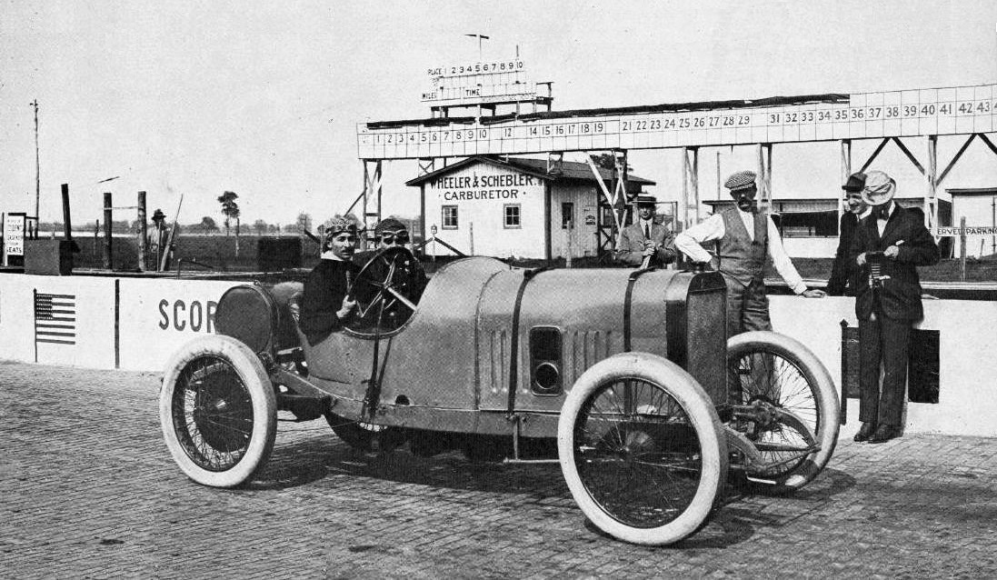 Jules Goux au départ d'Indianapolis 500 en 1913, p.478